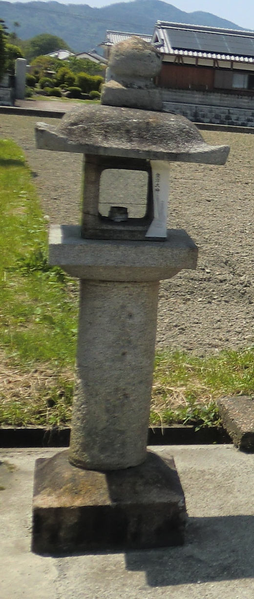 亀岡市にある愛宕灯篭